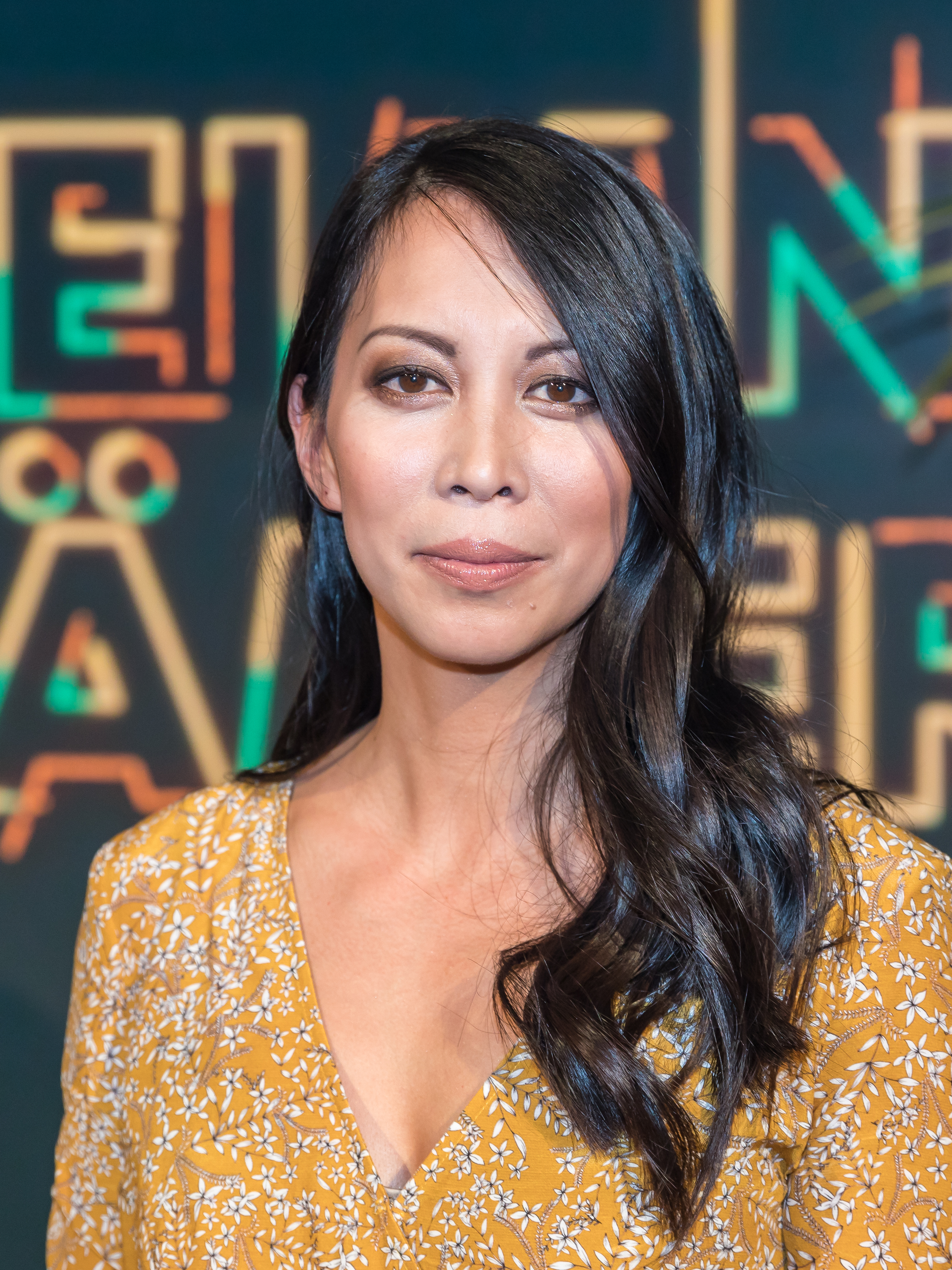 „Geheimniskrämer“ mit Martin Klempnow und seinen Gästen. Aufzeichnung des Westdeutschen Rundfunks im Studio Köln-Bocklemünd vom 24. Januar 2018 Foto: Minh-Khai Phan-Thi